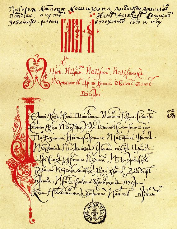 Автограф сочинения, ныне известного как «О России в царствование Алексея Михайловича»